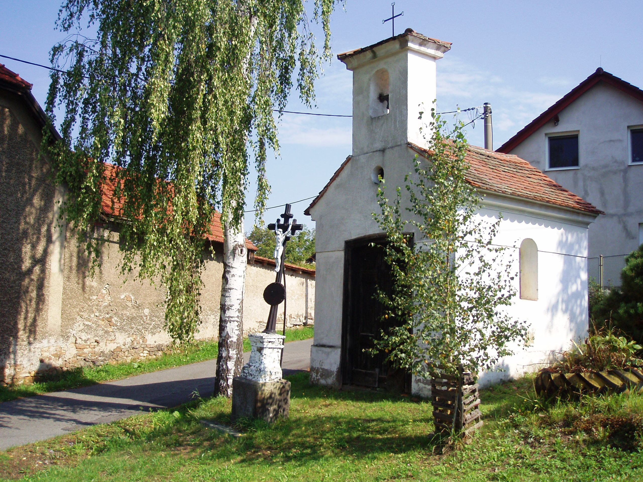 Lštěň - kaple